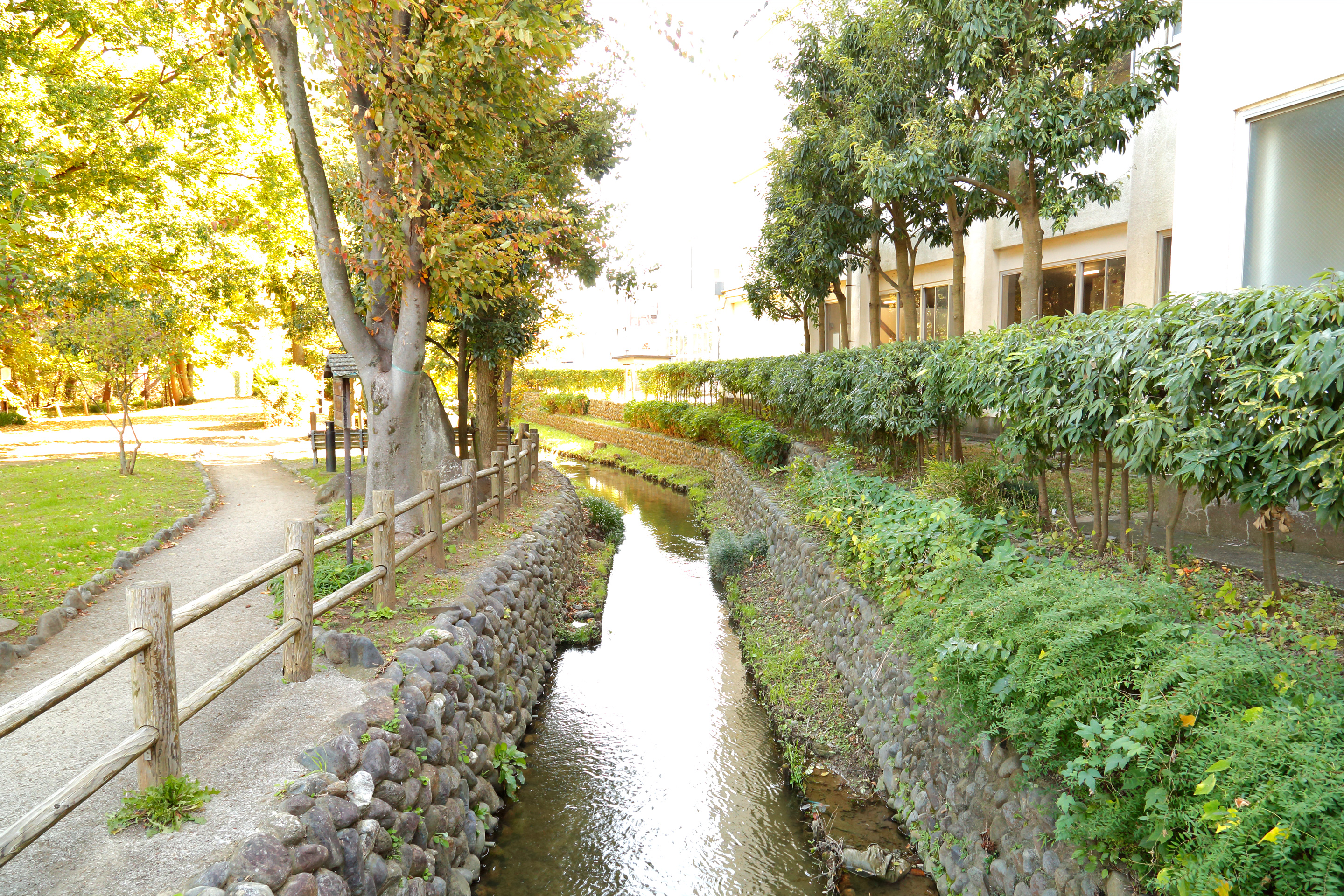 日野市新井にある向島用水親水路。